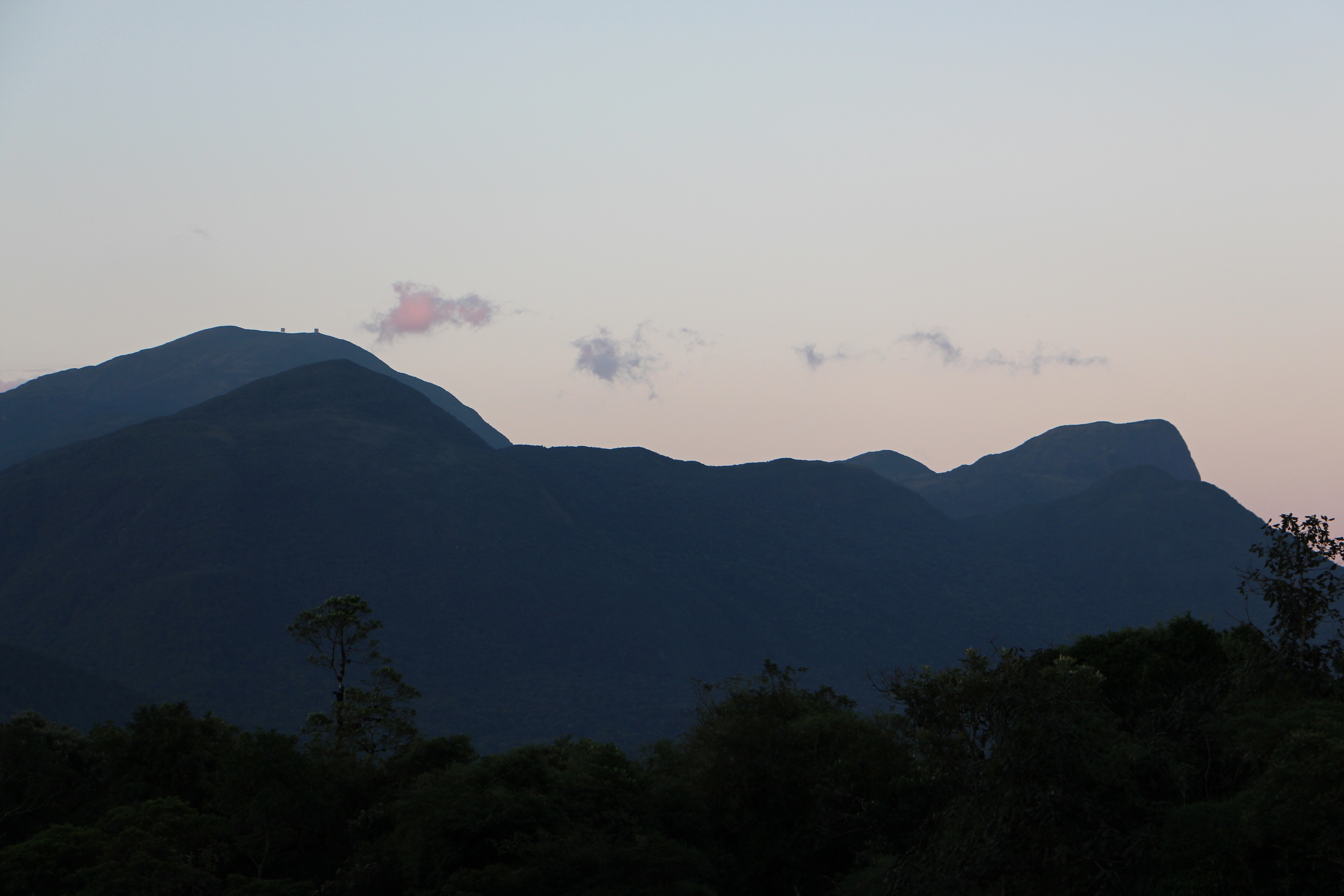 Vista geral a partir da Estrada da Graciosa, ao final da tarde.